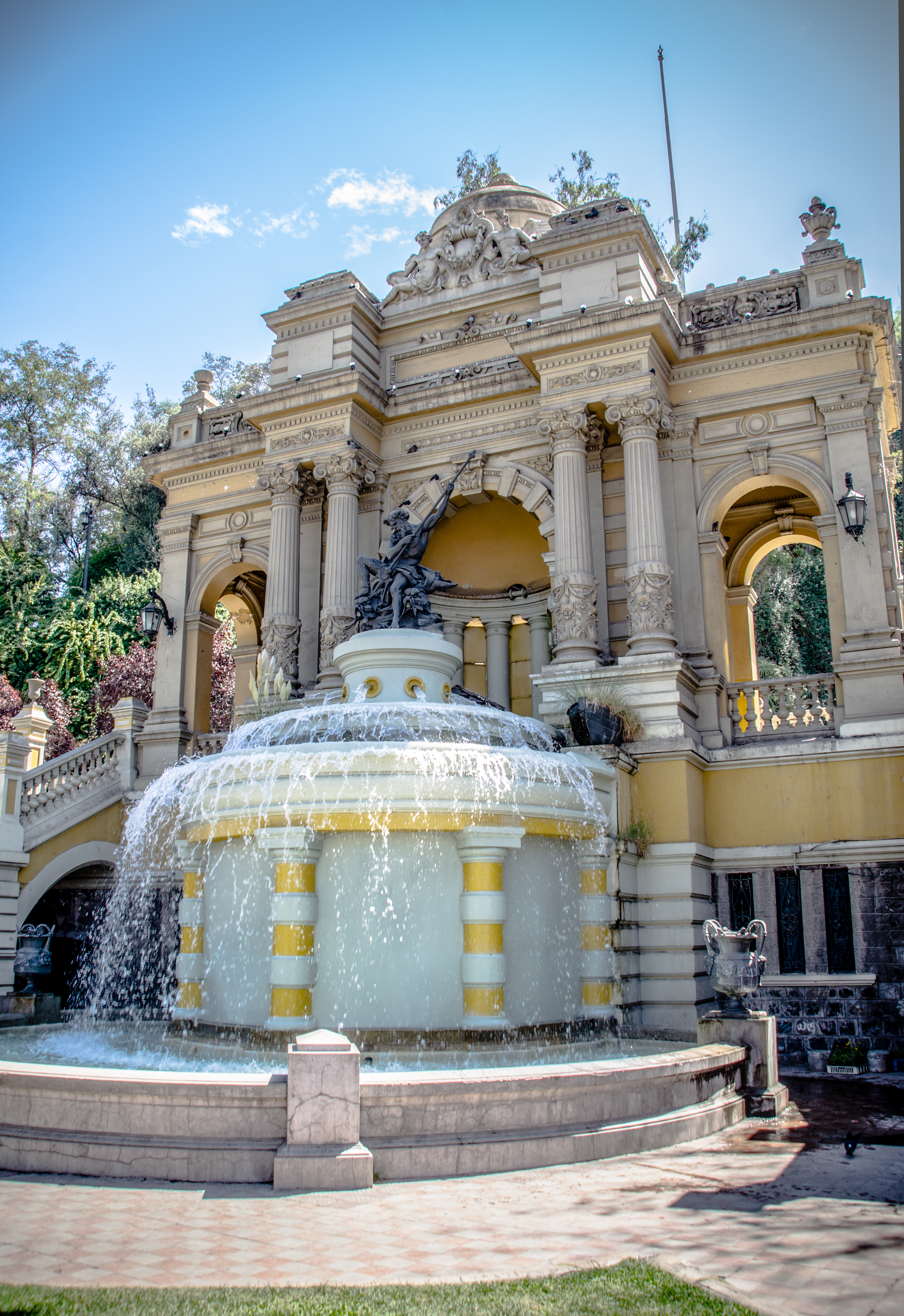 Cerro Santa Lucía This is a photo of a national monument in Chile: 226